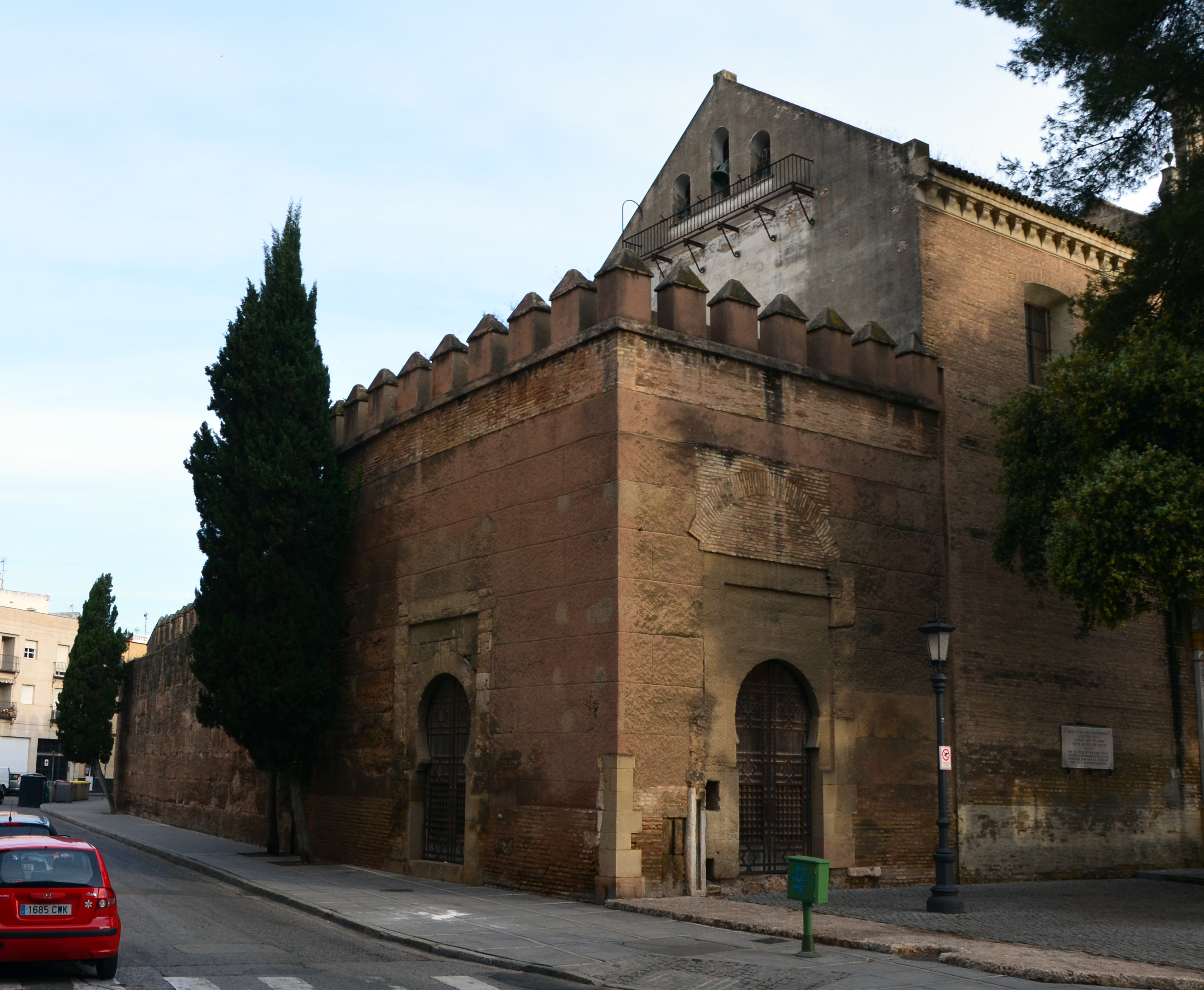 La porte de Cordoue (puerta de Córdoba) de Séville (Espagne). Porte de ville almoravide, reconstruite au XVIe siècle et très peu modifiée depuis, elle montre encore l'aspect fermé et militaire des portes d'origine. Elle se trouve à l'angle entre les rues Puerta de Córdoba et Madre Dolores Márquez, au nord de l'enceinte.